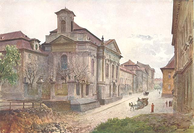 Kostel svatého Karla Boromejského v Resslově ulici